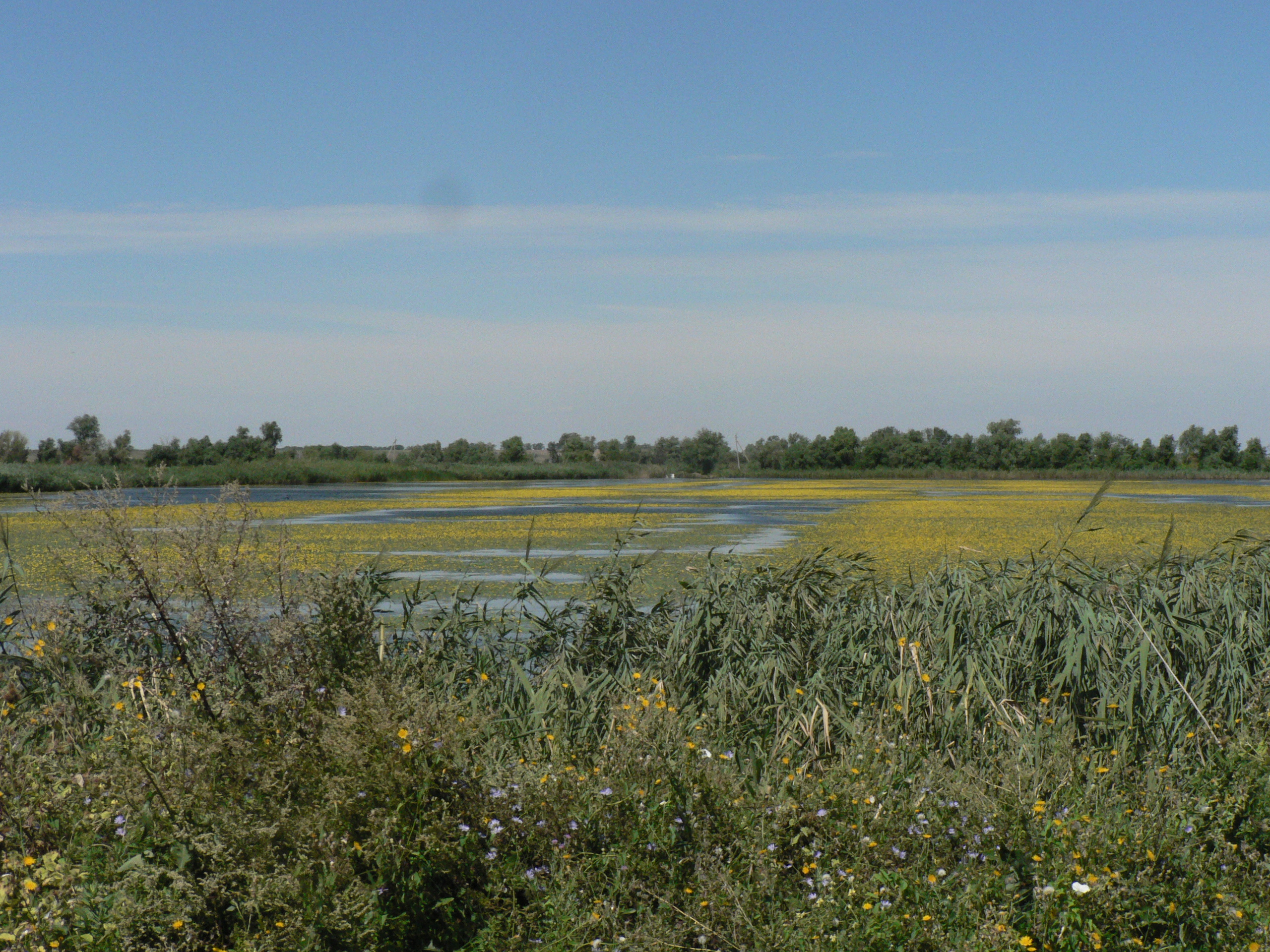 В районі с. Стара Некрасовка Ізмаїльського району